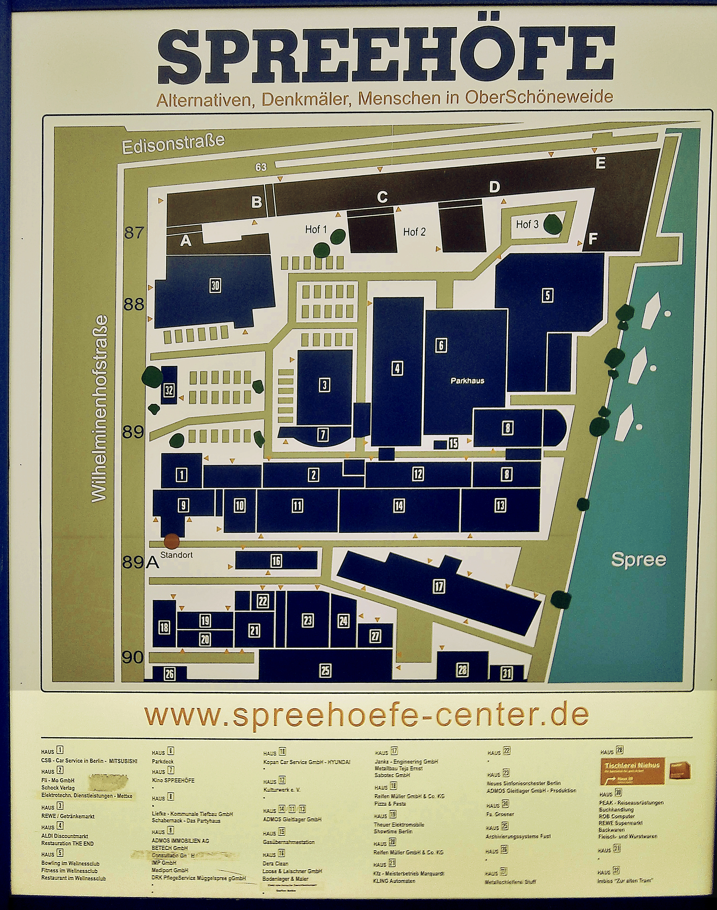 Wilheminenhofstraße ist eine Straße im Berliner Bezirk Treptow-Köpenick. Die Grundstücksfläche 89 gehört zum Ortsteil Oberschöneweide. An der Südseite der Straße zur Spree entstanden um 1910 Industrie- und Gewerbeanlagen. Nach dem Mauerfall änderte sich der Charakter der Fläche aus den Industriegebäuden westlich der Edisonstraße wurden der Gewerbepark der Spreehöfe gebildet. Hier wurde in zwei ehemaligen Produktionshallen 1998 ein Kino eingerichtet.